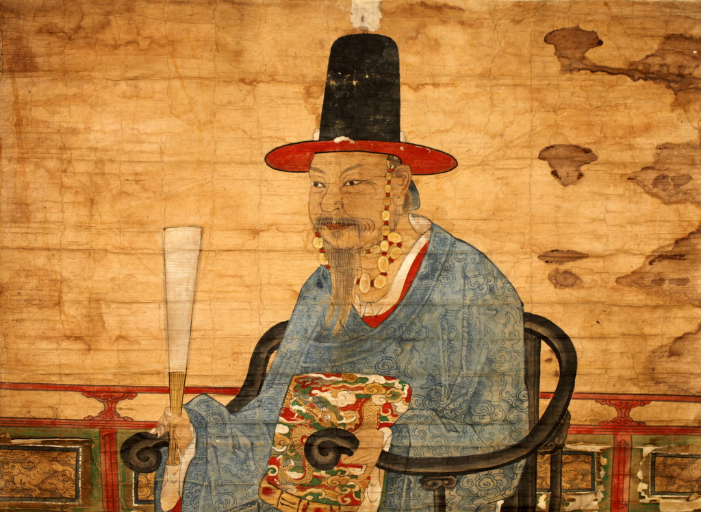 朝鮮宣祖坐